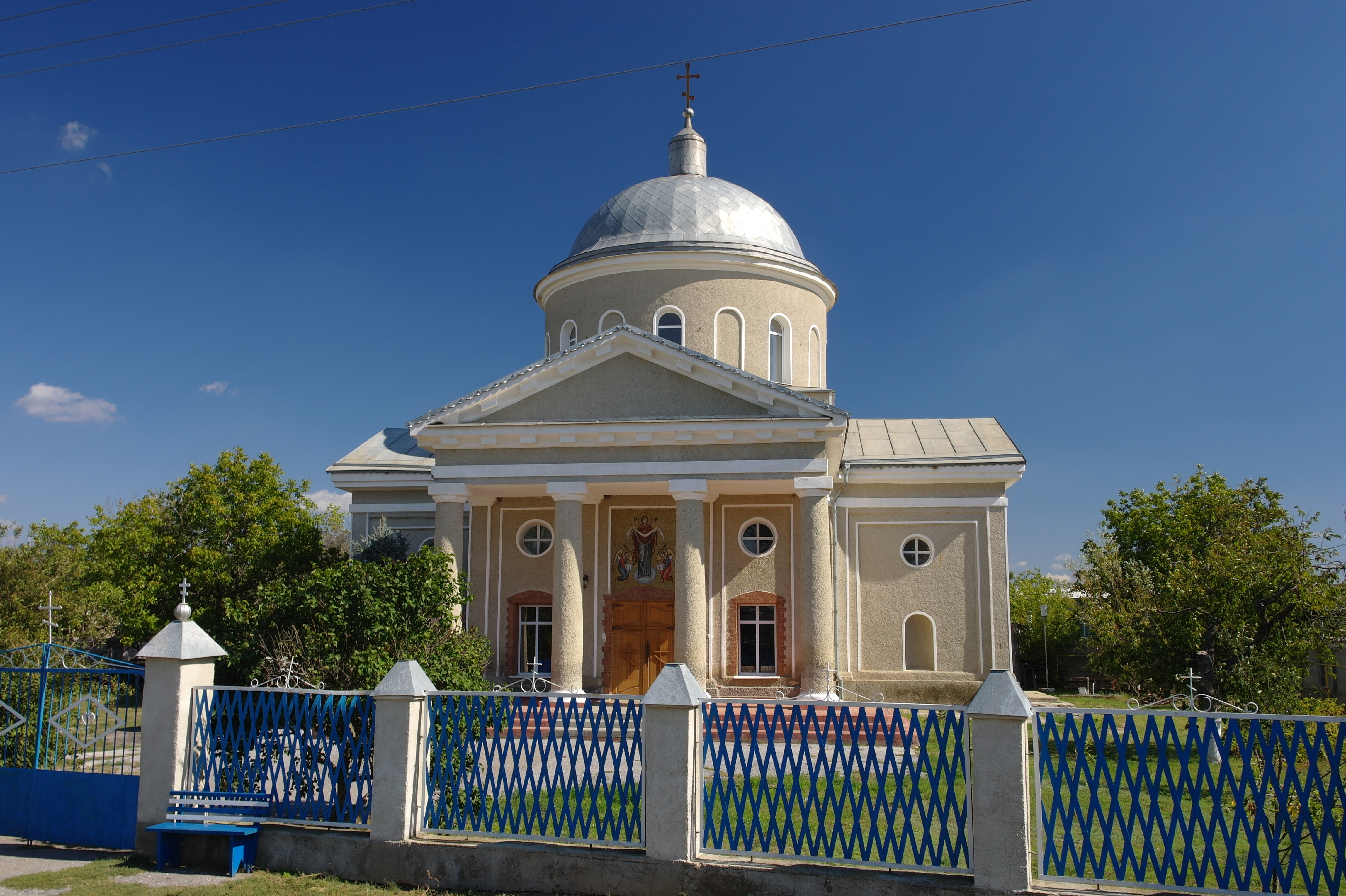 Петрівка, Покровська церква